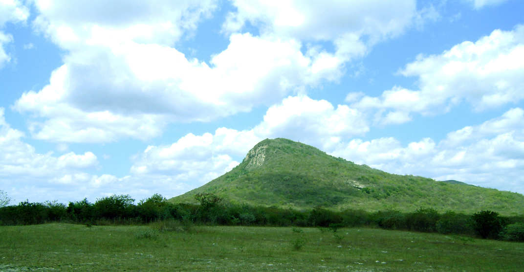 Serra da Boa Vista do município de Itatira, Ceará.